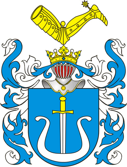 Herb Nowina Clan